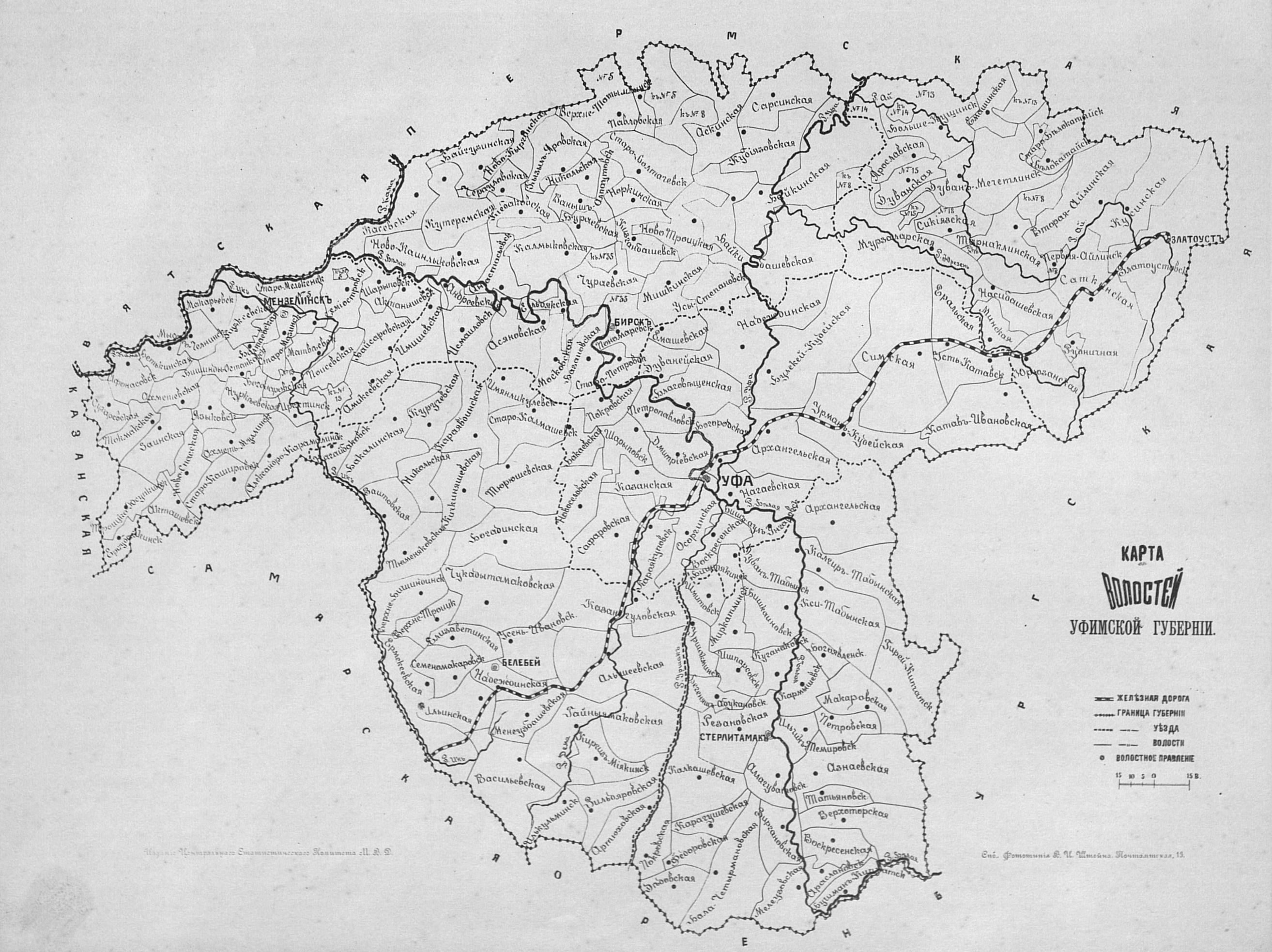 Карта волостей Уфимской губернии